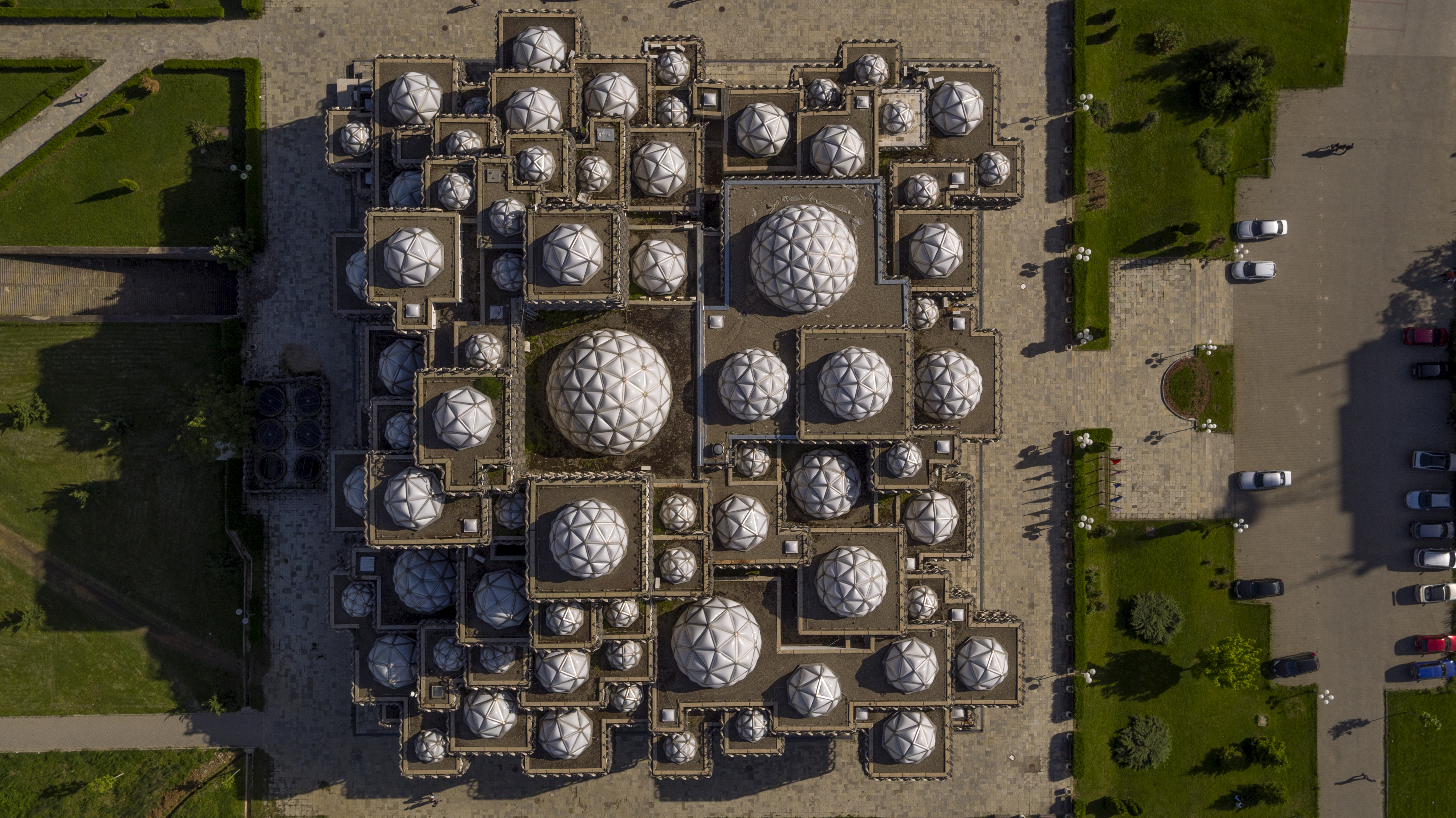 Letecký pohled na budovu národní knihovny od Pjetera Bogdaniho v Prištině